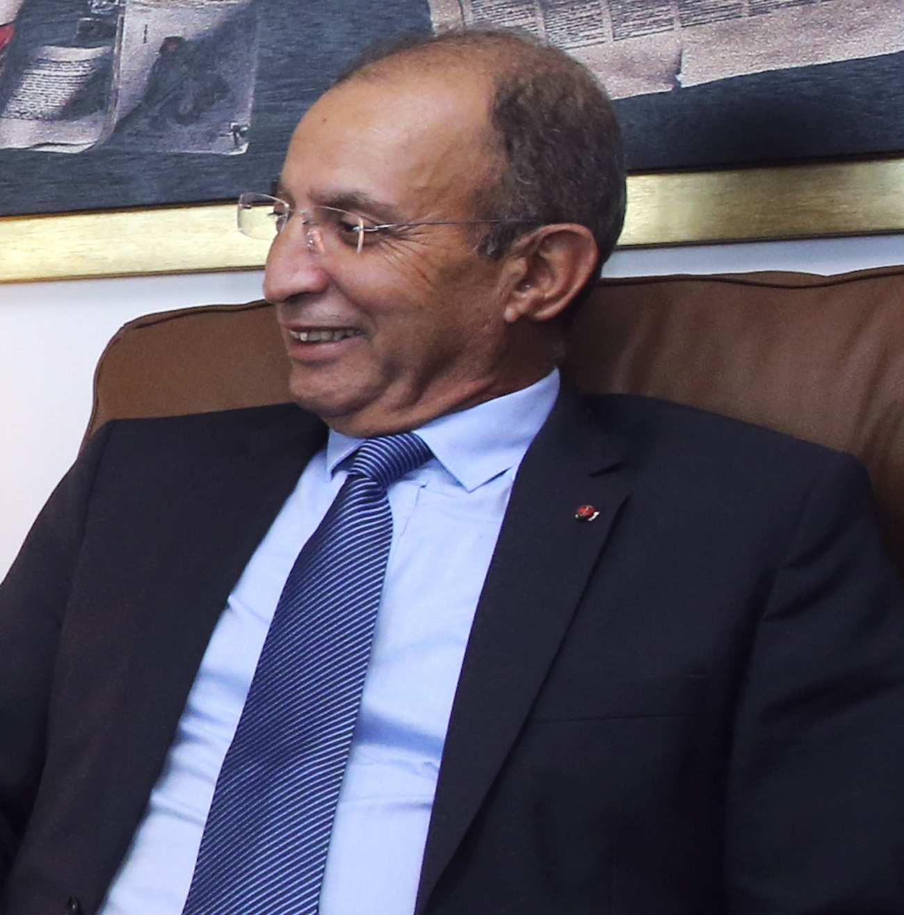 Dimitris Avramopoulos